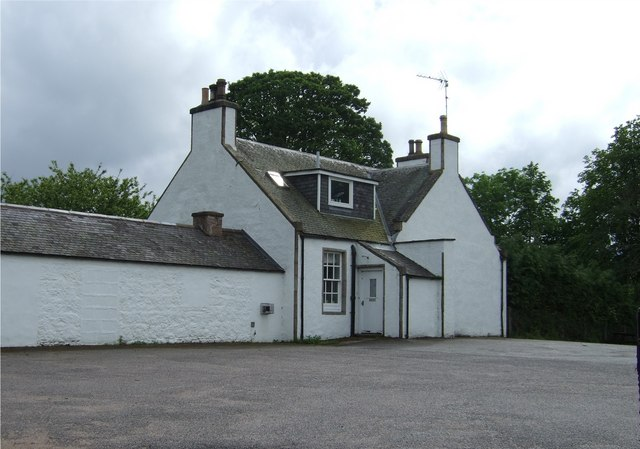 Logie Coldstone school, Aberdeenshire